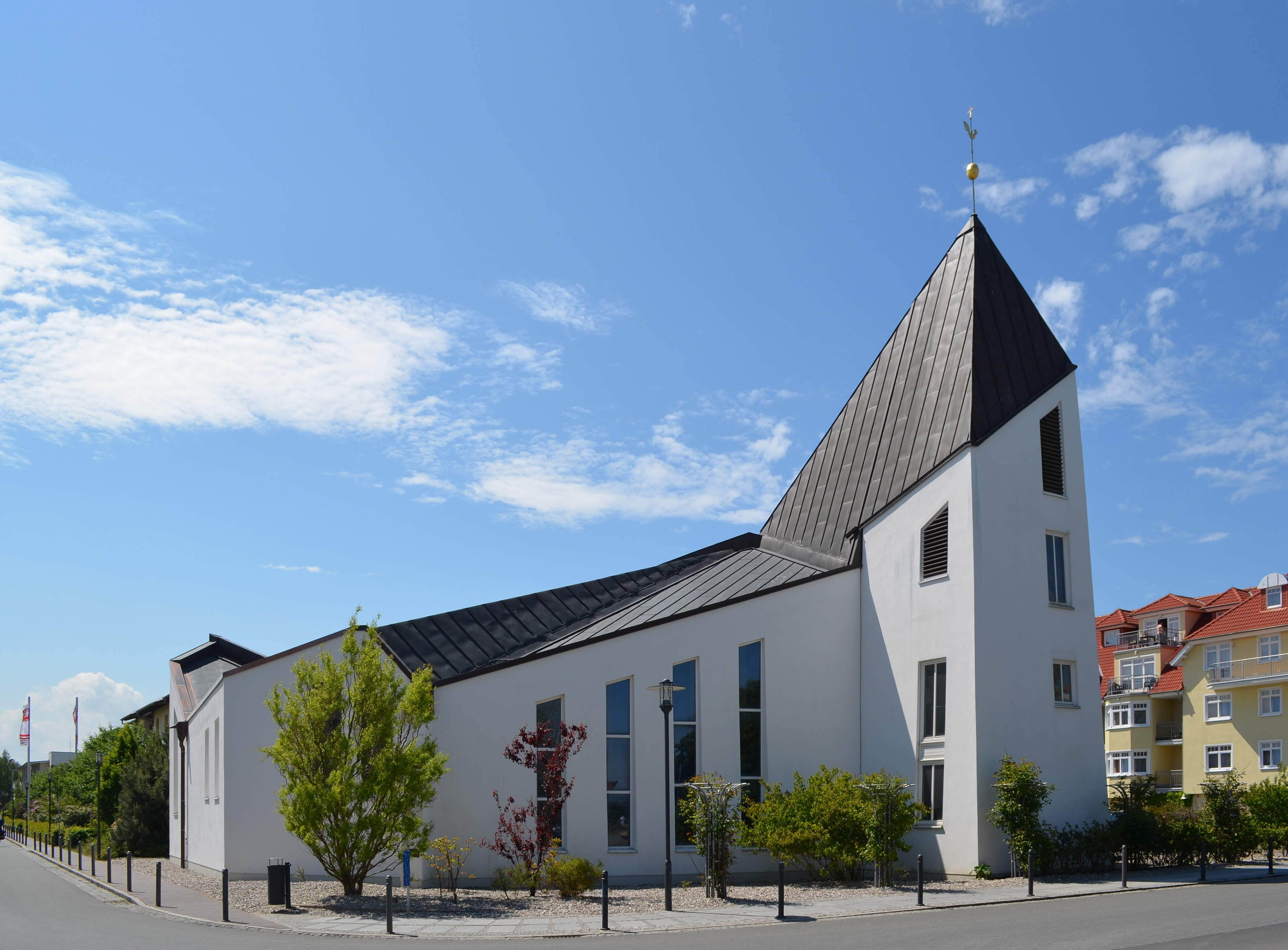 Kühlungsborn, Kath. Dreifaltigkeitskirche, Außenansicht 9